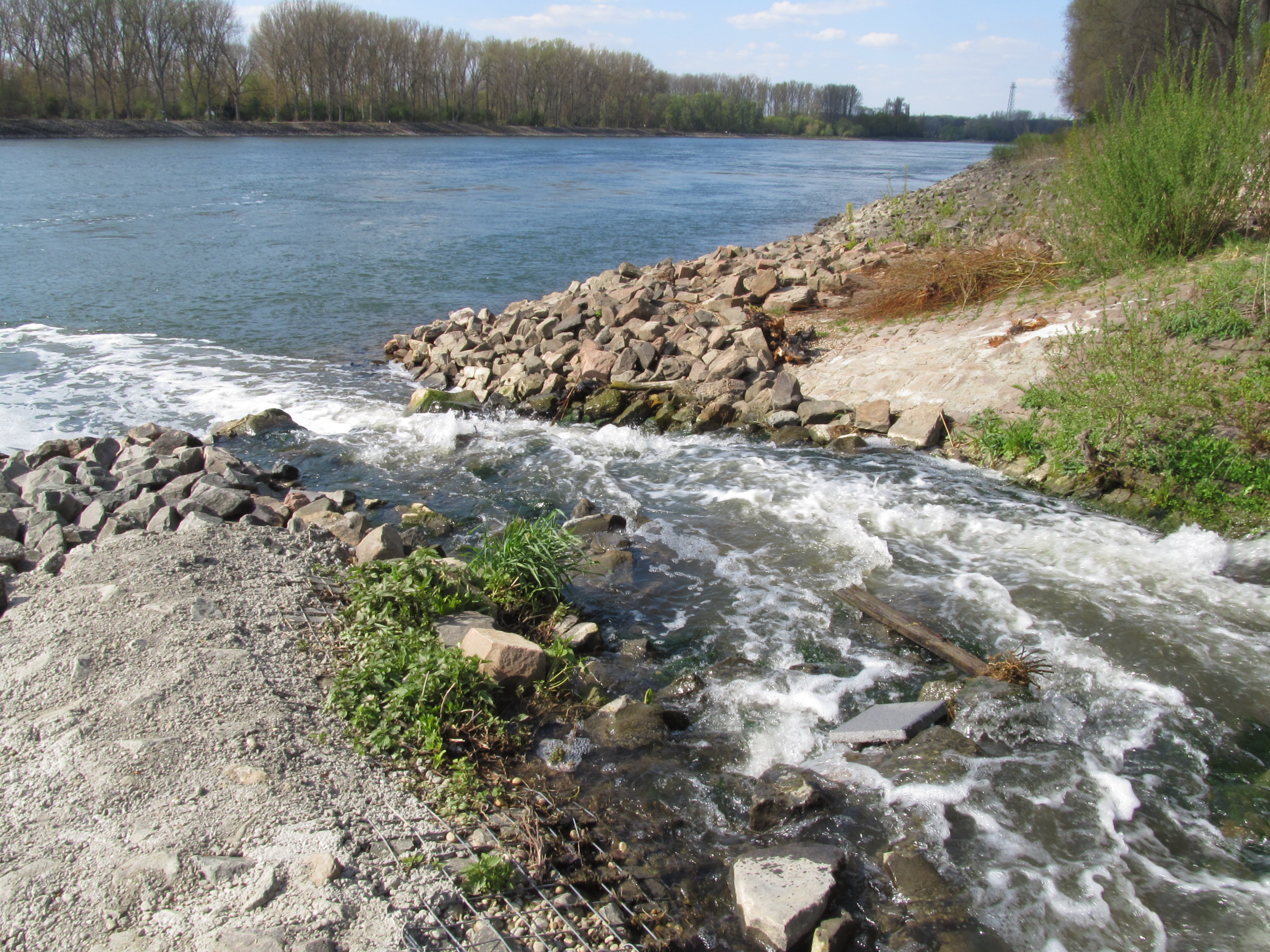 Leimbachmündung in den Rhein im Bereich des NSG Schwetzinger Wiesen